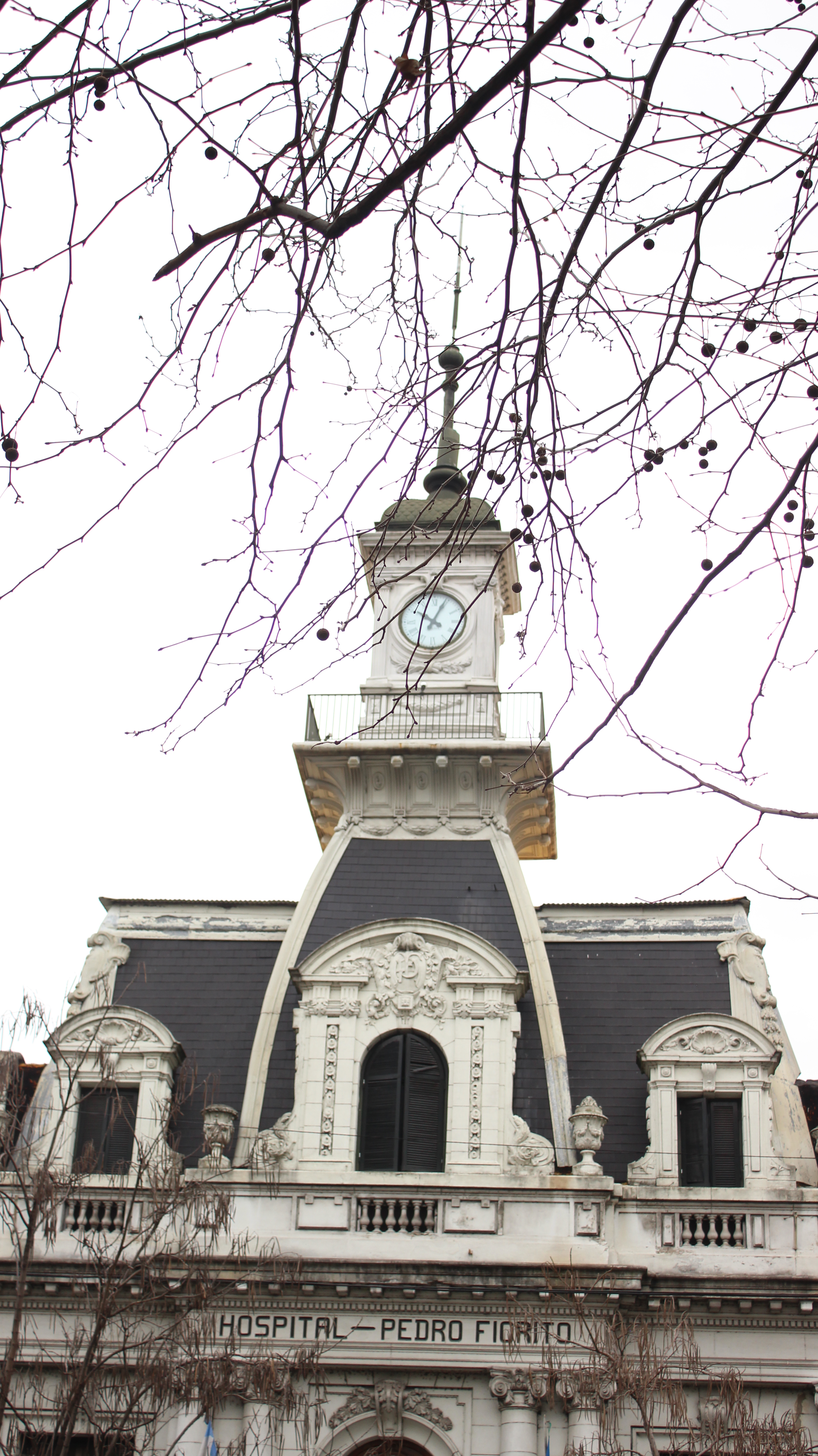 Detalle del frente del Hospital Fiorito